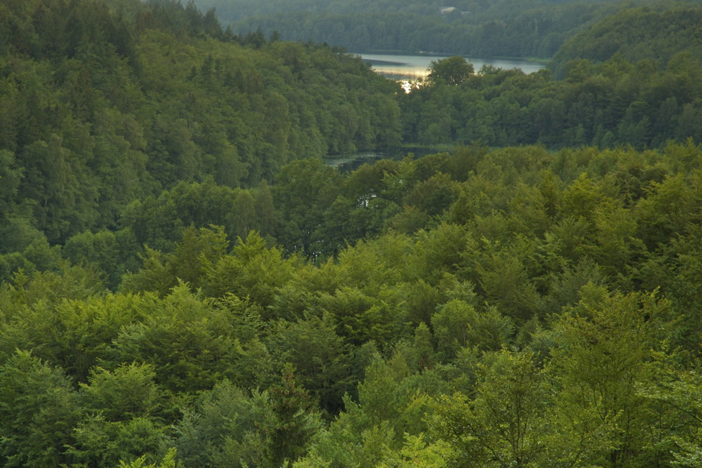 Szczelina Lechicka, widok na jezioro Potęgowskie